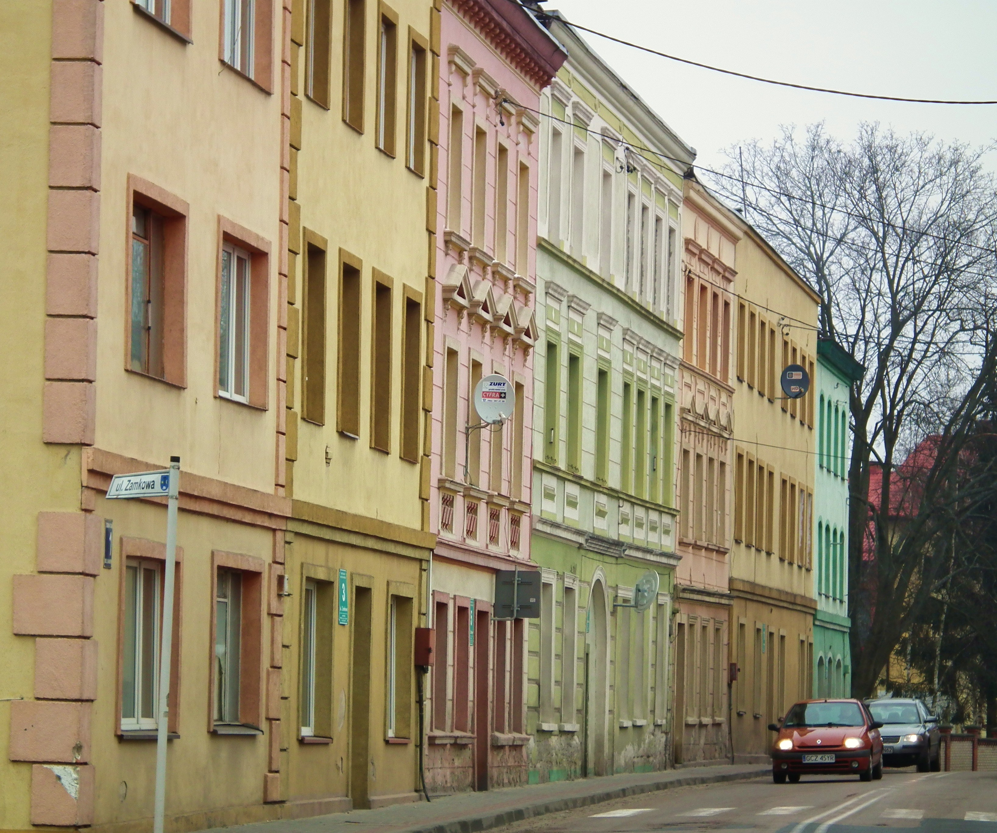 Ulica Zamkowa w Czarnem.